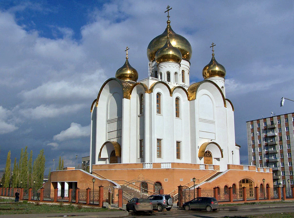 Собор